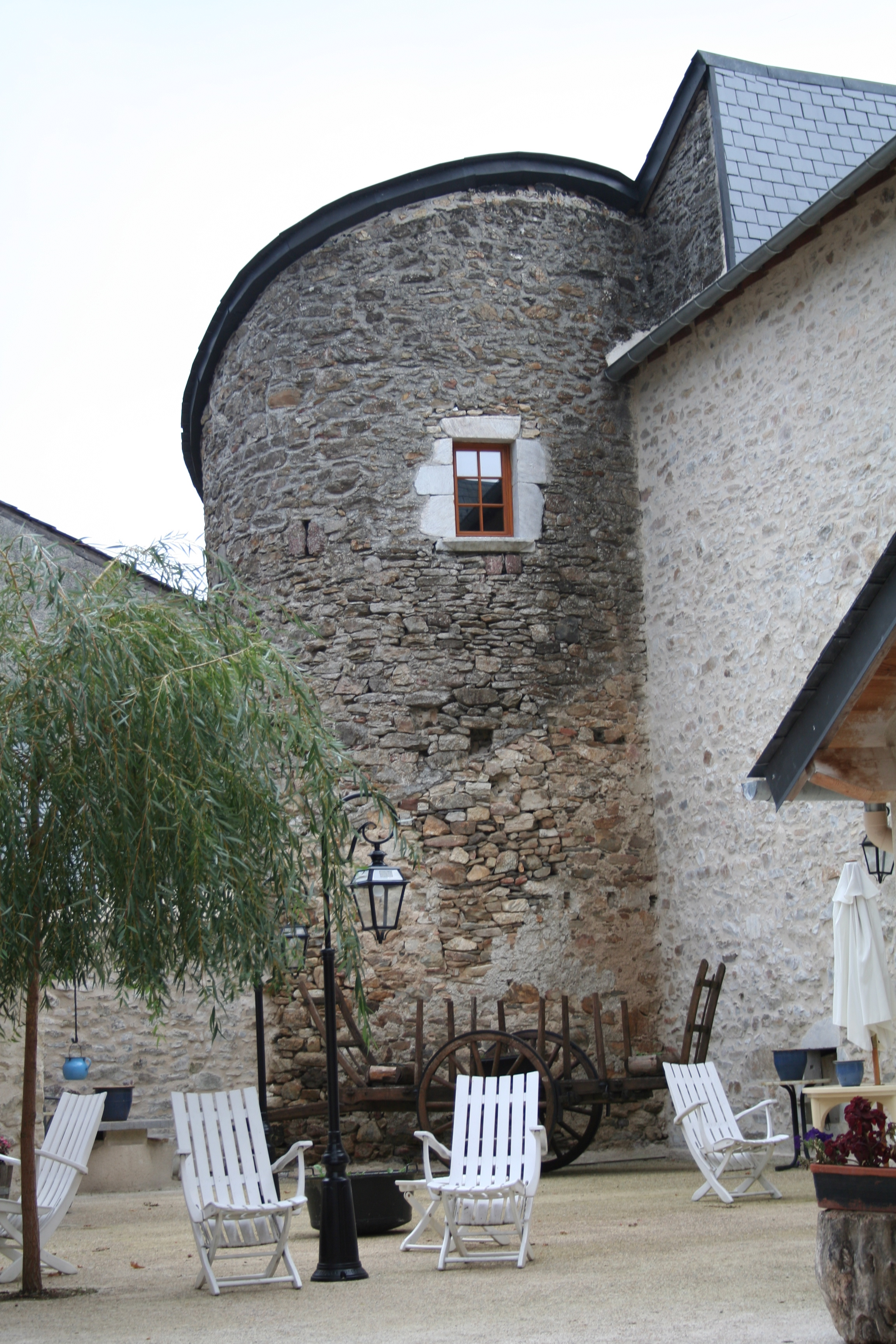 Tour ronde du château de Nages (Tarn).